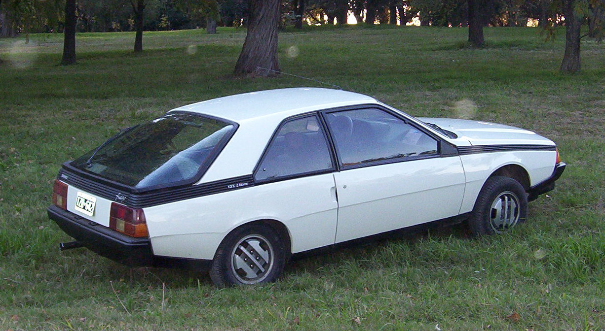 Renault Fuego GTX 2.0 1981. Este auto fue comprado en Argentina, pero fue una de las pocas importadas de Francia antes de que comenzara la producción local. Tiene varias diferencias con la versión Argentina.